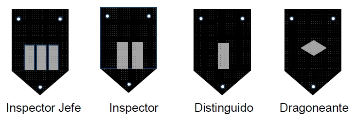 Jinetas para el personal de sub-oficiales y dragoneantes en uniforme de fatiga del cuerpo de custodia y vigilancia nacional del INPEC